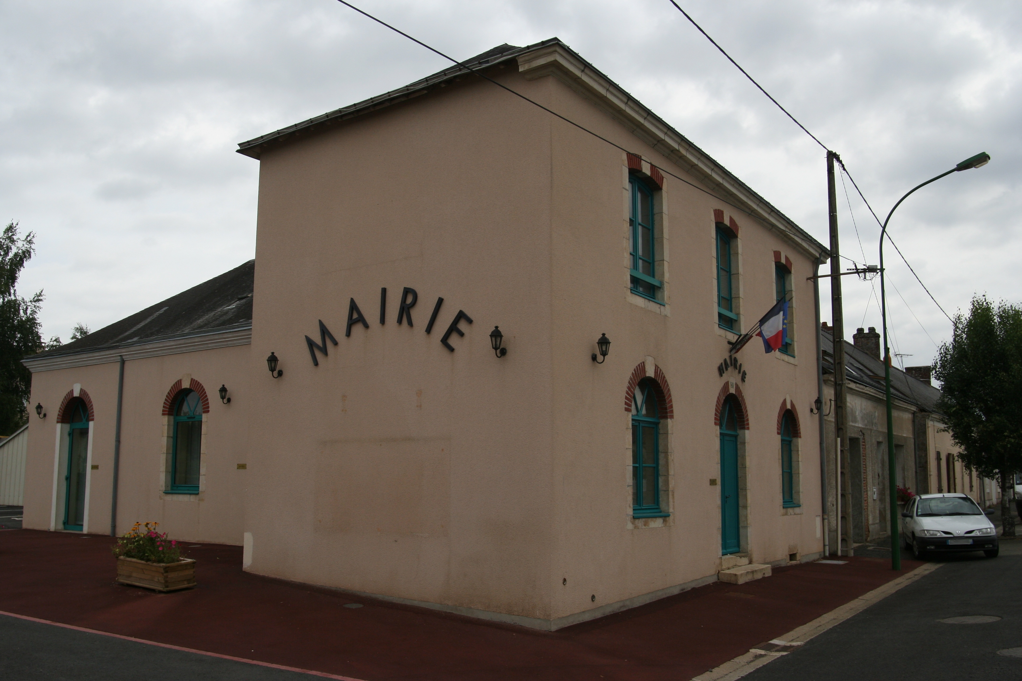 La mairie de Chaufour-Notre-Dame.